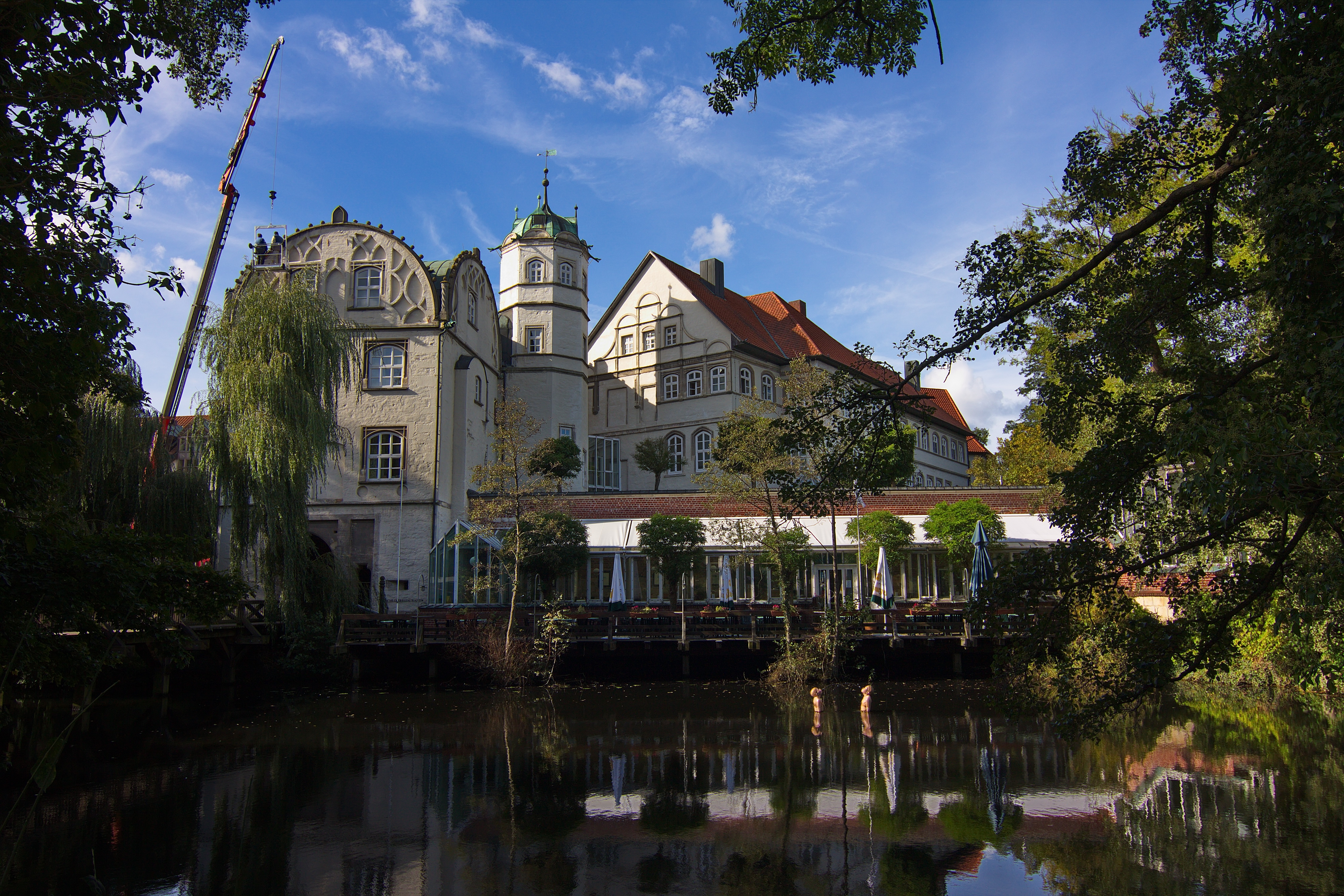 Das Schloss Gifhorn ist eine zwischen 1525 und 1581 im Stil der Weserrenaissance erbaute Schlossanlage in Gifhorn. Das bis 1790 festungsmäßig ausgebaute Schloss mit seinen Wassergräben, Wällen und Bastionen wurde nie eingenommen. Im 16. Jahrhundert war es unter Herzog Franz von Braunschweig-Lüneburg nur 10 Jahre lang Residenz des Herzogtums Gifhorn.